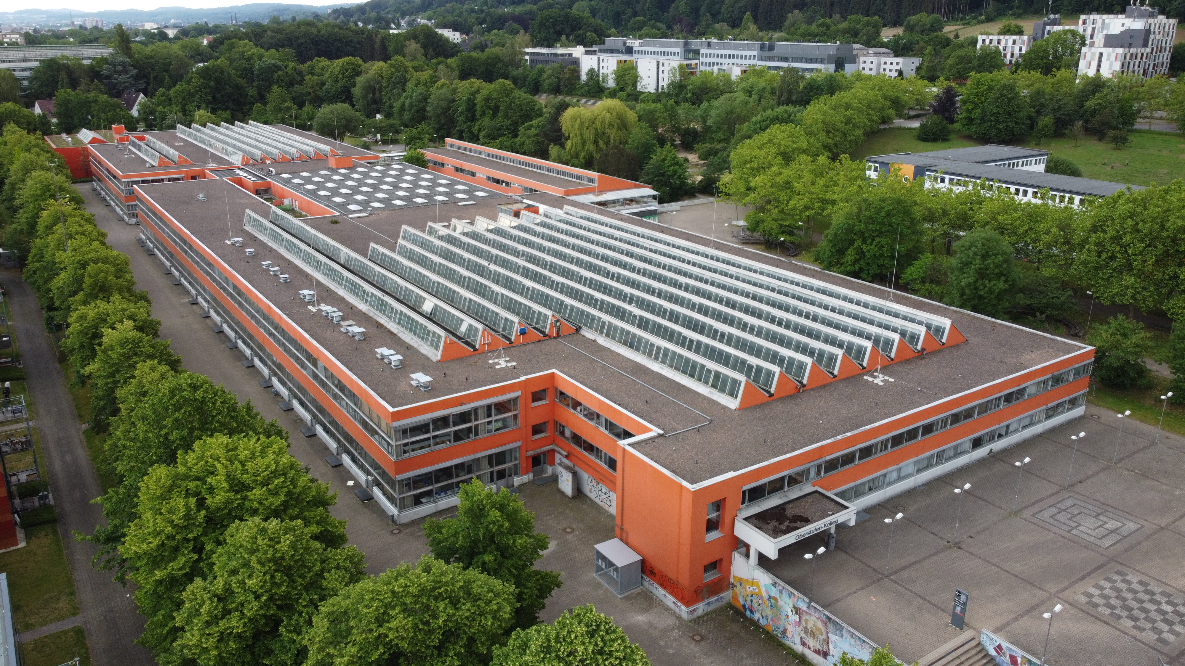 Oberstufen-Kolleg Bielefeld Luftbild Nähe Universität Bielefeld